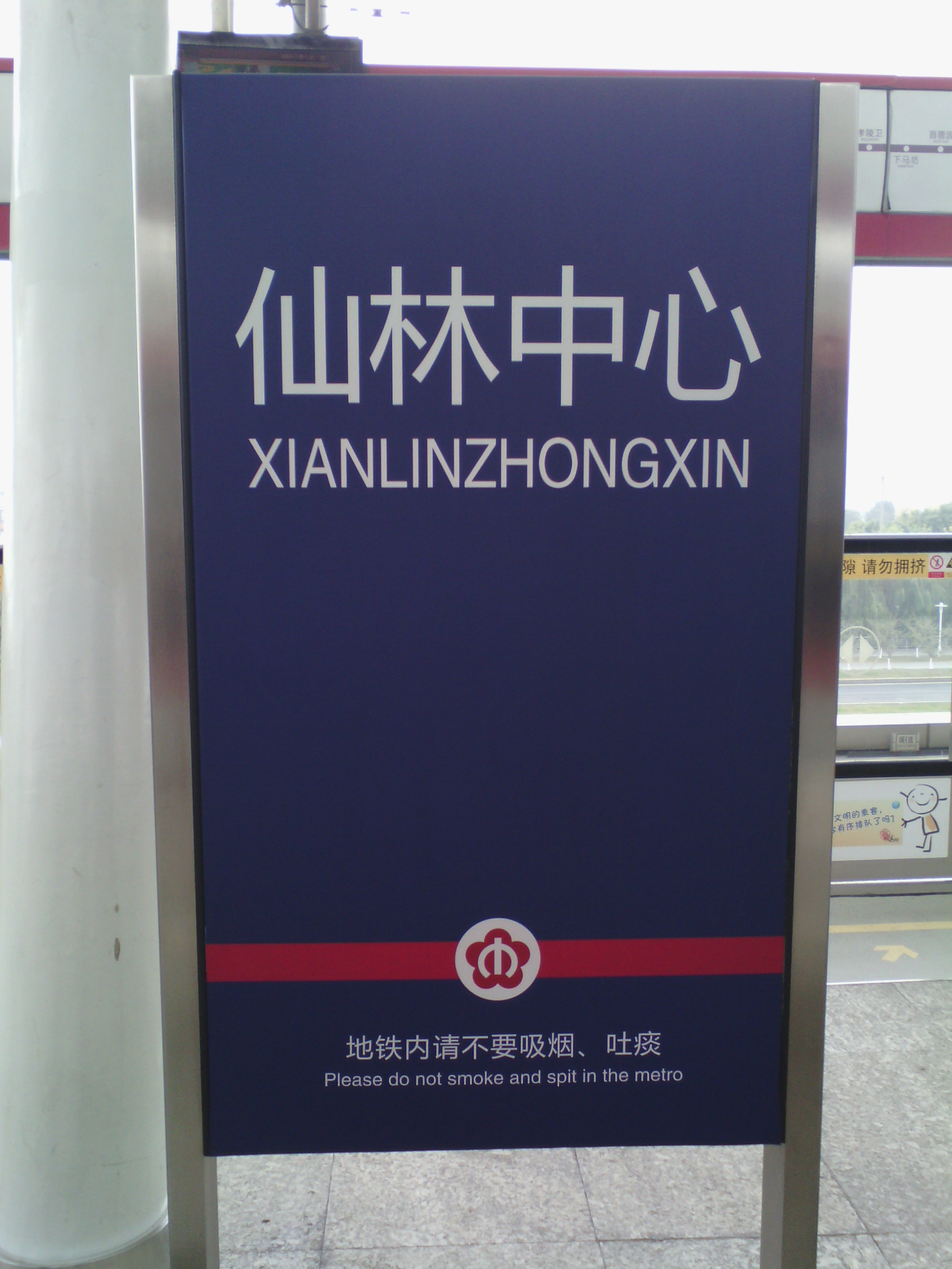 xianlin centre station